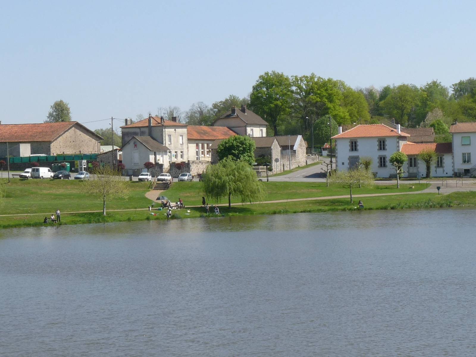 étang de Montrollet un dimanche, Charente, France